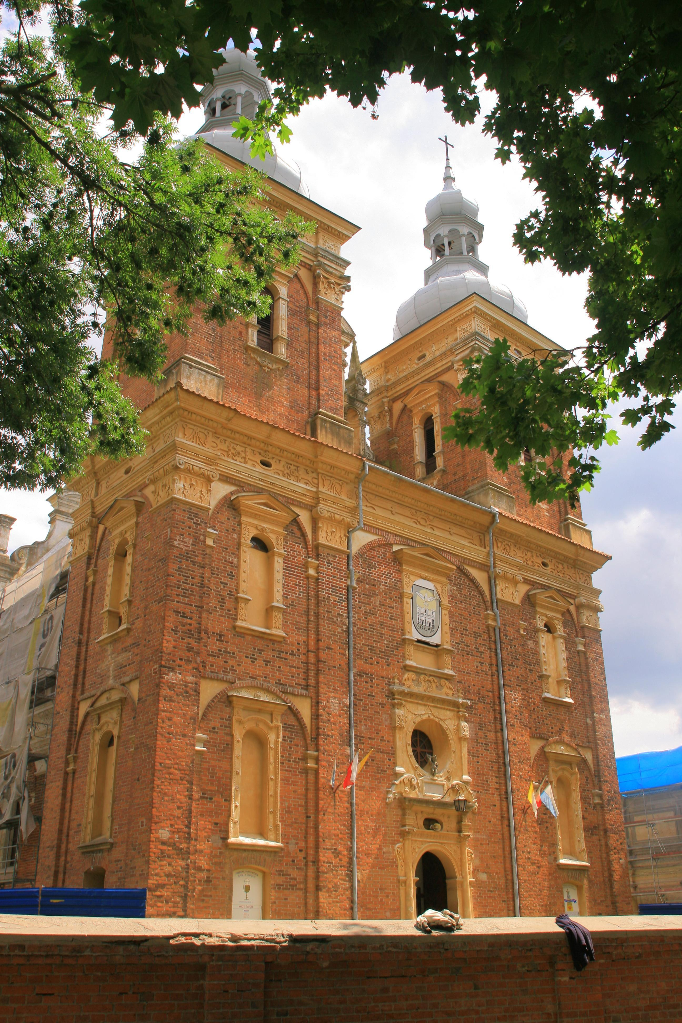 Gołąb, Poland